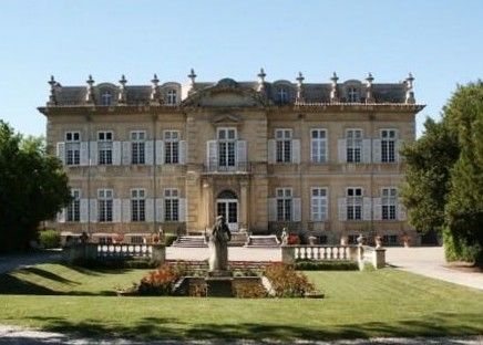 Château de Barbentane